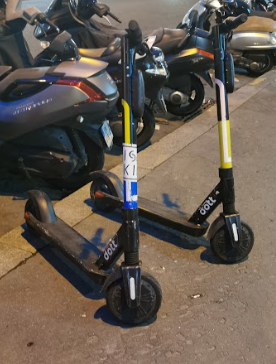 Trottinettes électriques, à Paris, dans le 5e arrondissement.